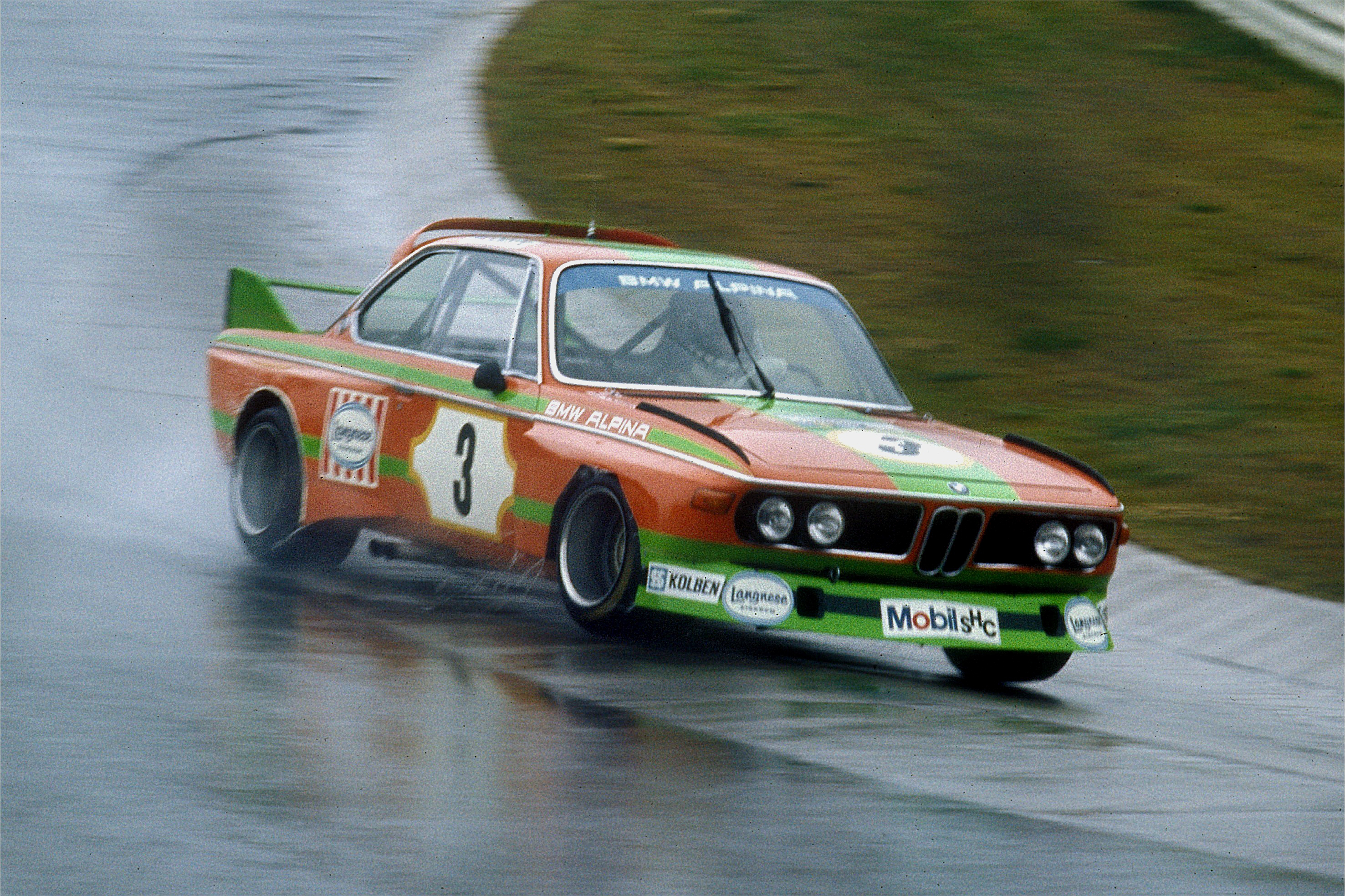 Helmut Koinigg im BMW Alpina, Training zum 6-Stunden-Rennen des ADAC, Streckenabschnitt Schwalbenschwanz, „Kleines Karussell“